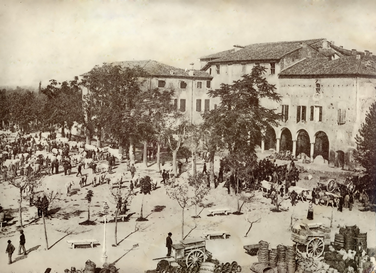 Mercato del bestiame nella piazza antistante al castello dei Pico a Mirandola, in un'immagine del 1902